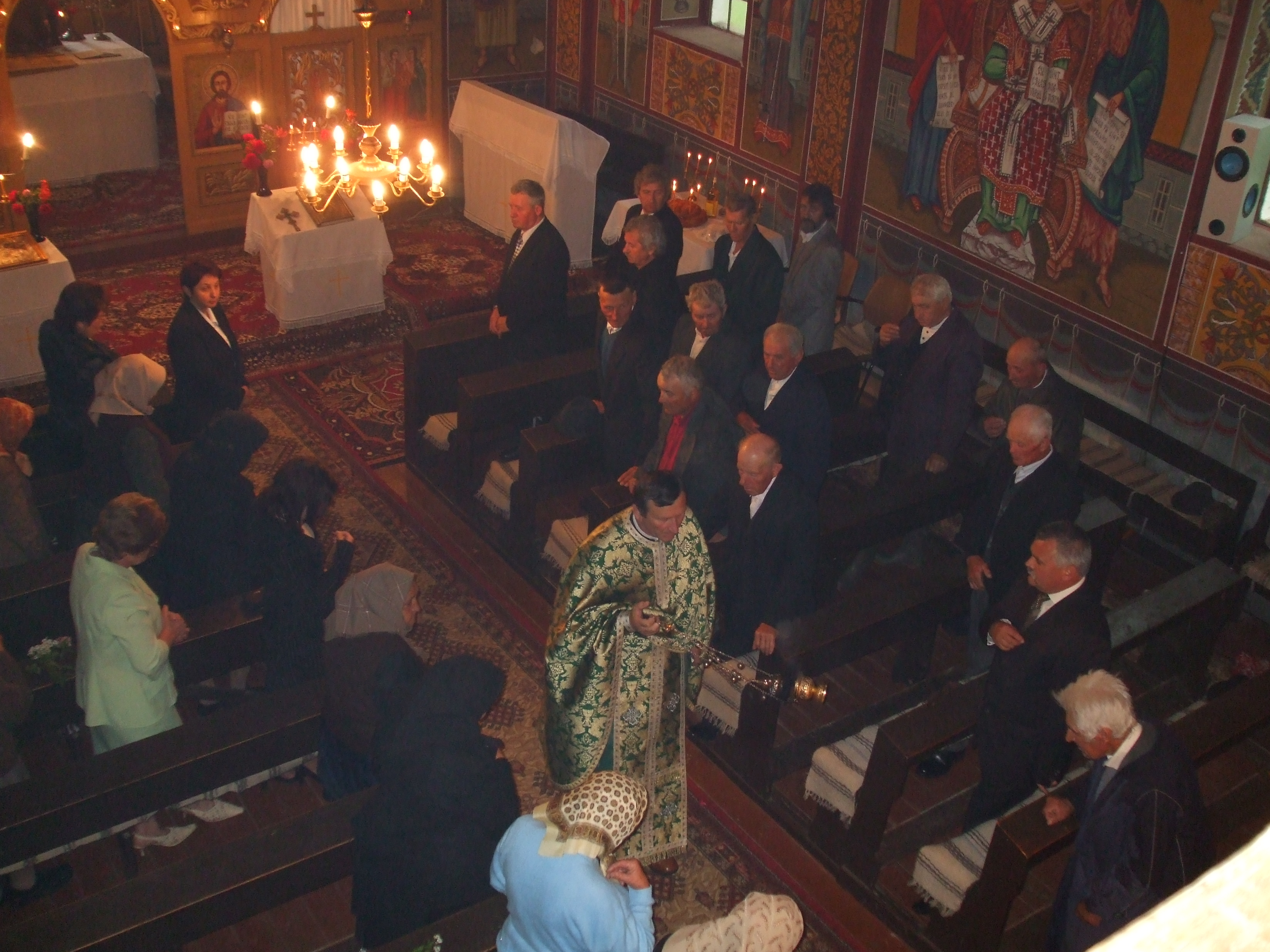 Imagini din Aruncuta (Interior Biserica)